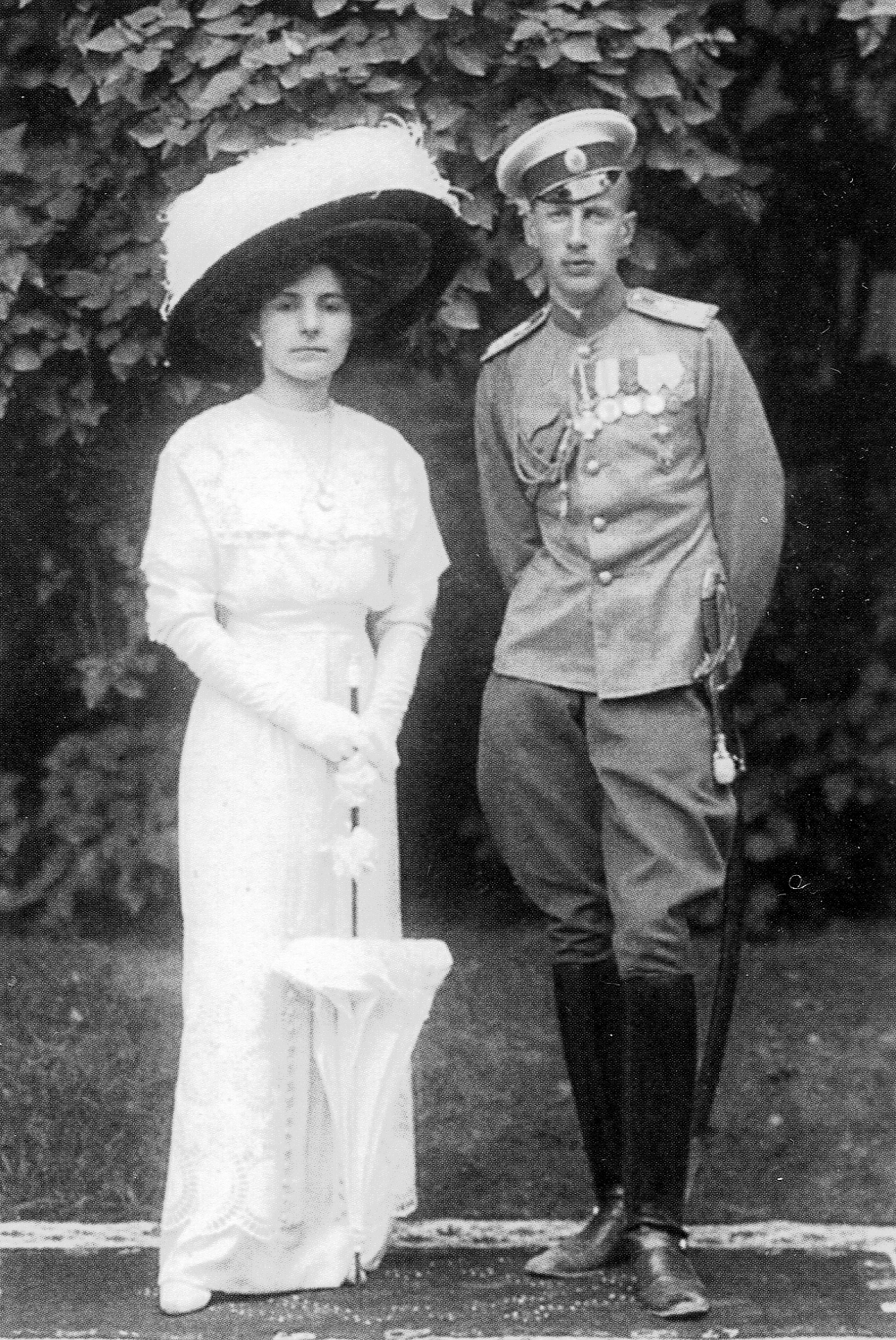 Иоанн Константинович с супругой Еленой Павловной Скан фото, приведённого в книге : Завьялова Л.,Орлов К.Великий князь Константин Константинович и великие князья Константиновичи. СПб.2009. ISBN 978-5-93898-225-3